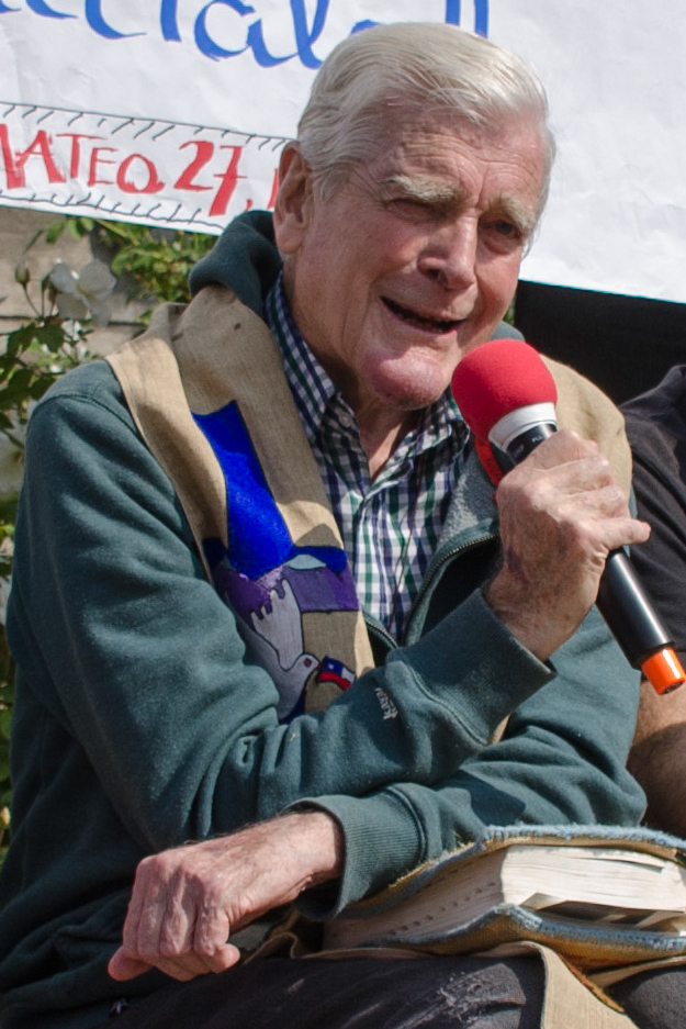 Mariano Puga, Villa Grimaldi, Vía crucis popular 2019